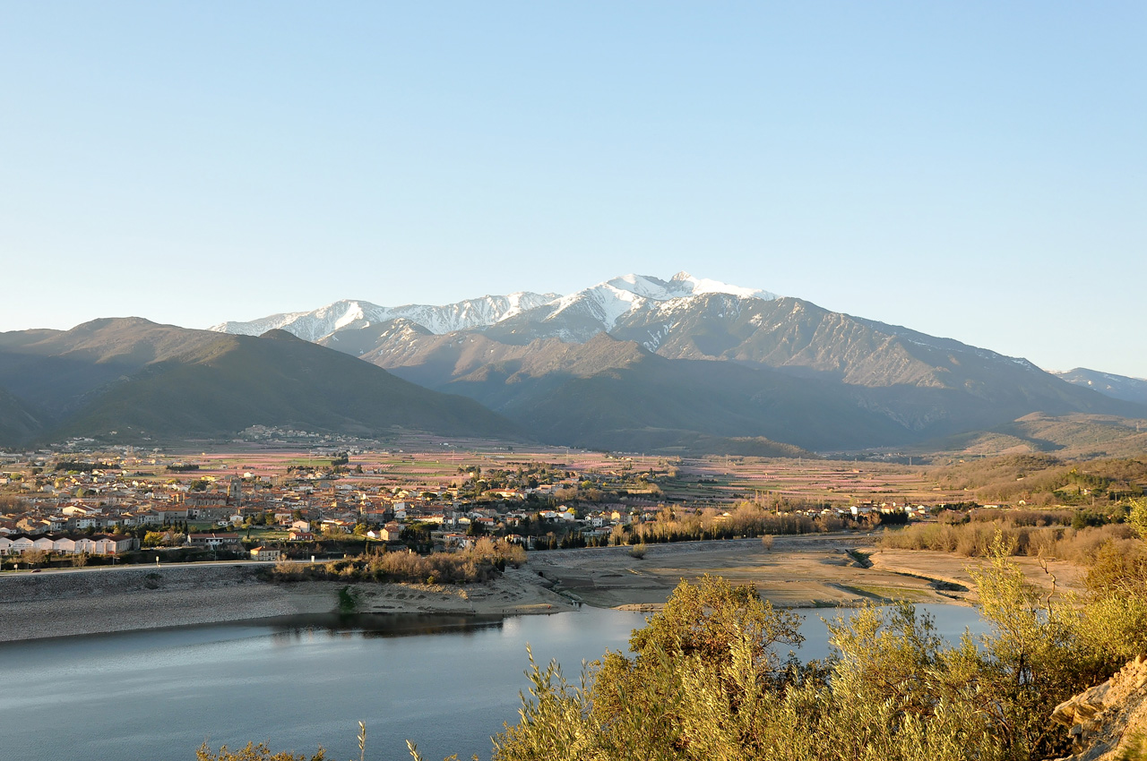 Vinça (66320 France) le retenue (25 millions de m3) et le Canigou